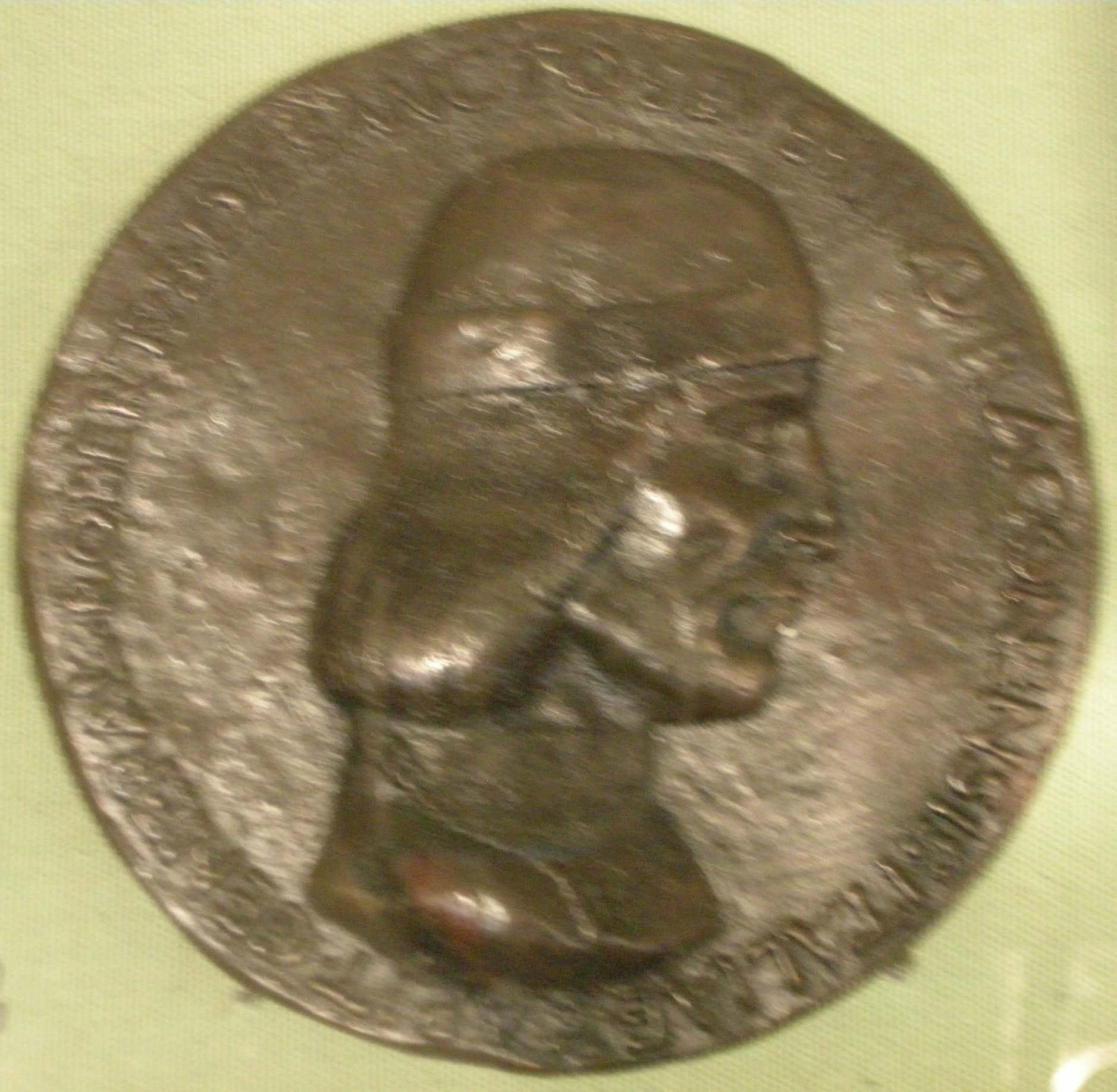 Roberto di sanseverino, 1486 ca